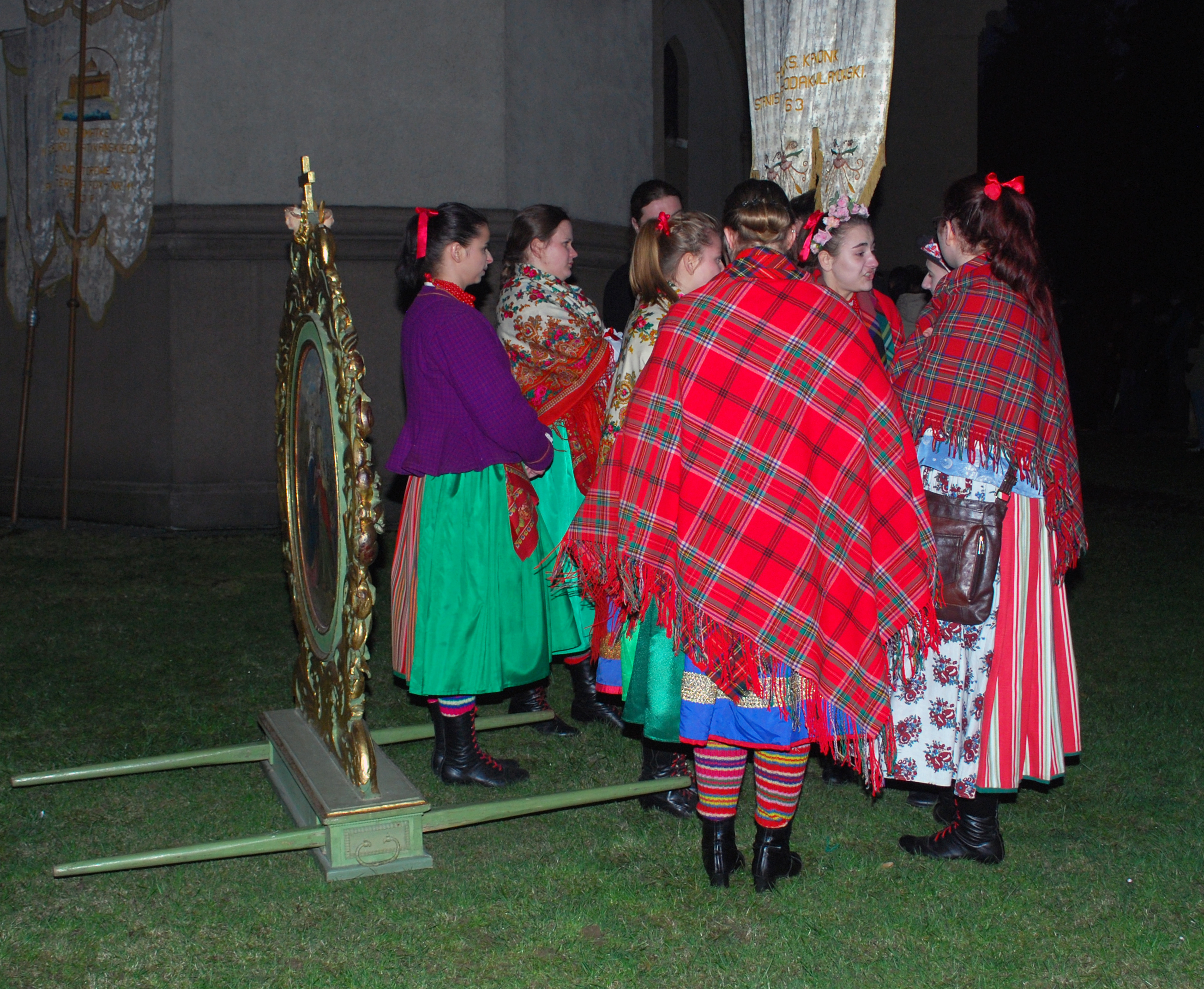 Wigila Paschalna w Wilamowicach - procesja